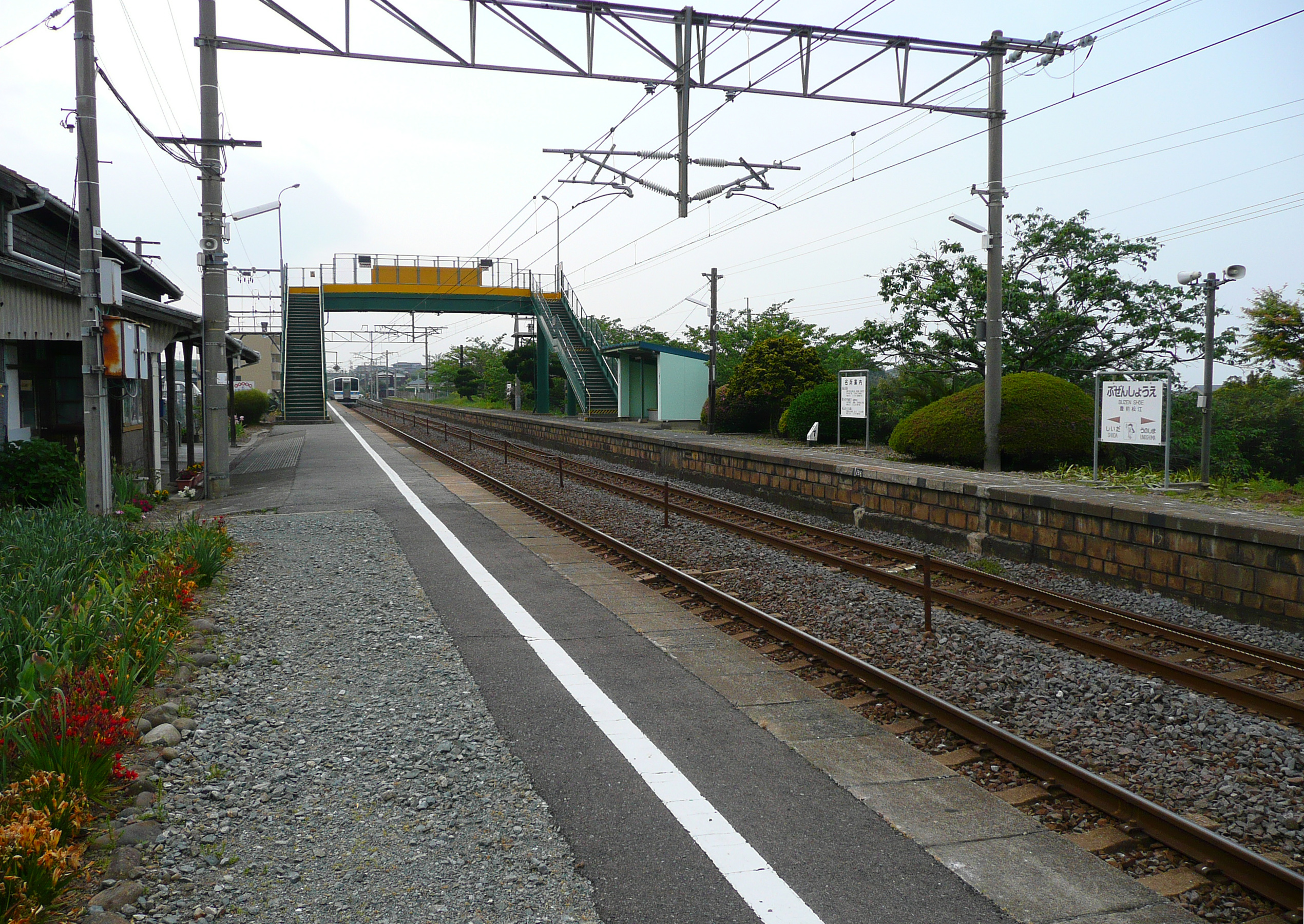 日豊本線・豊前松江駅ホーム（2007年撮影）